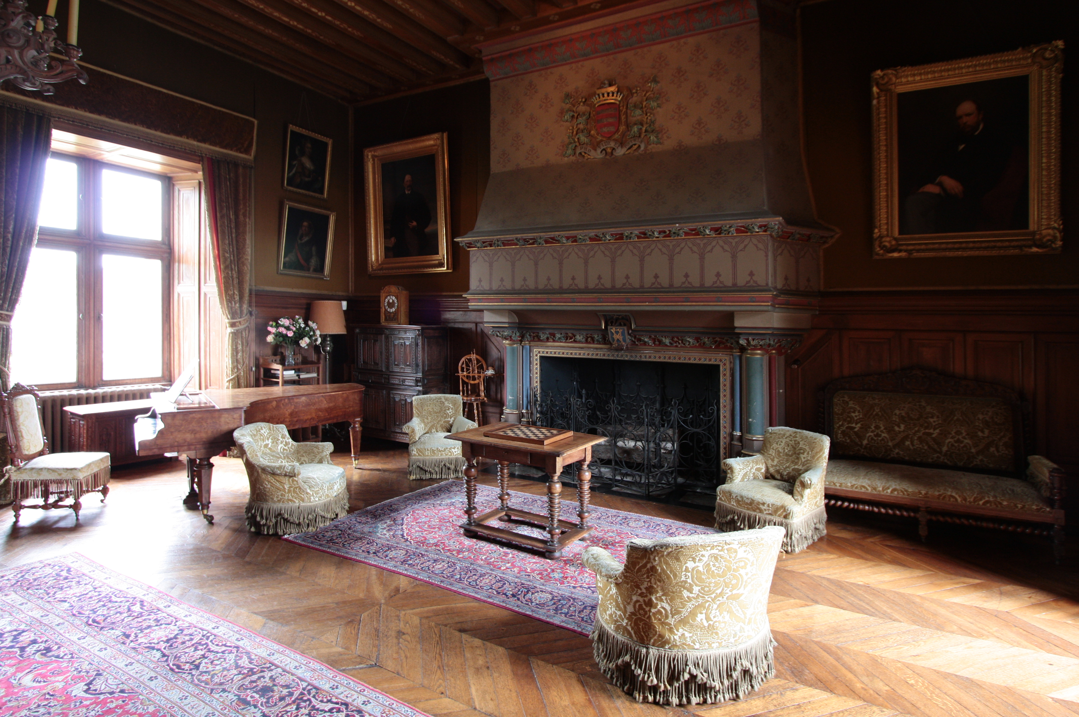 Schloss Montrésor im Département Indre-et-Loire/Frankreich - Großer Salon.